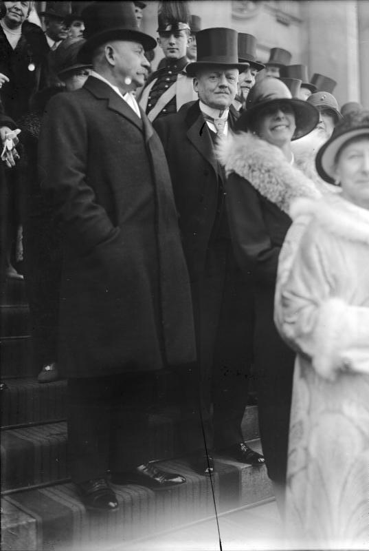 Der Vorsitzende der deutschnationalen Volkspartei Graf Westarp legt den Vorsitz seiner Partei nieder! Porträt des Grafen Westarp.